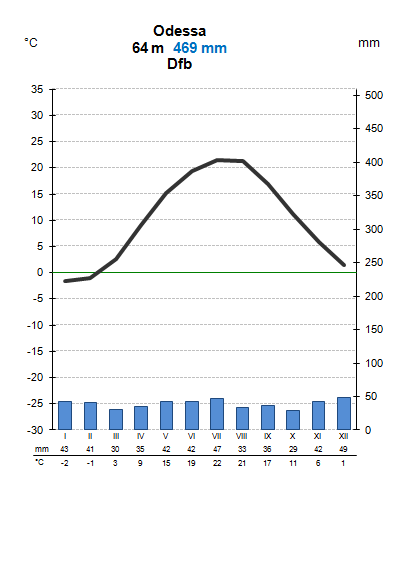 Odessa kliimadiagramm.